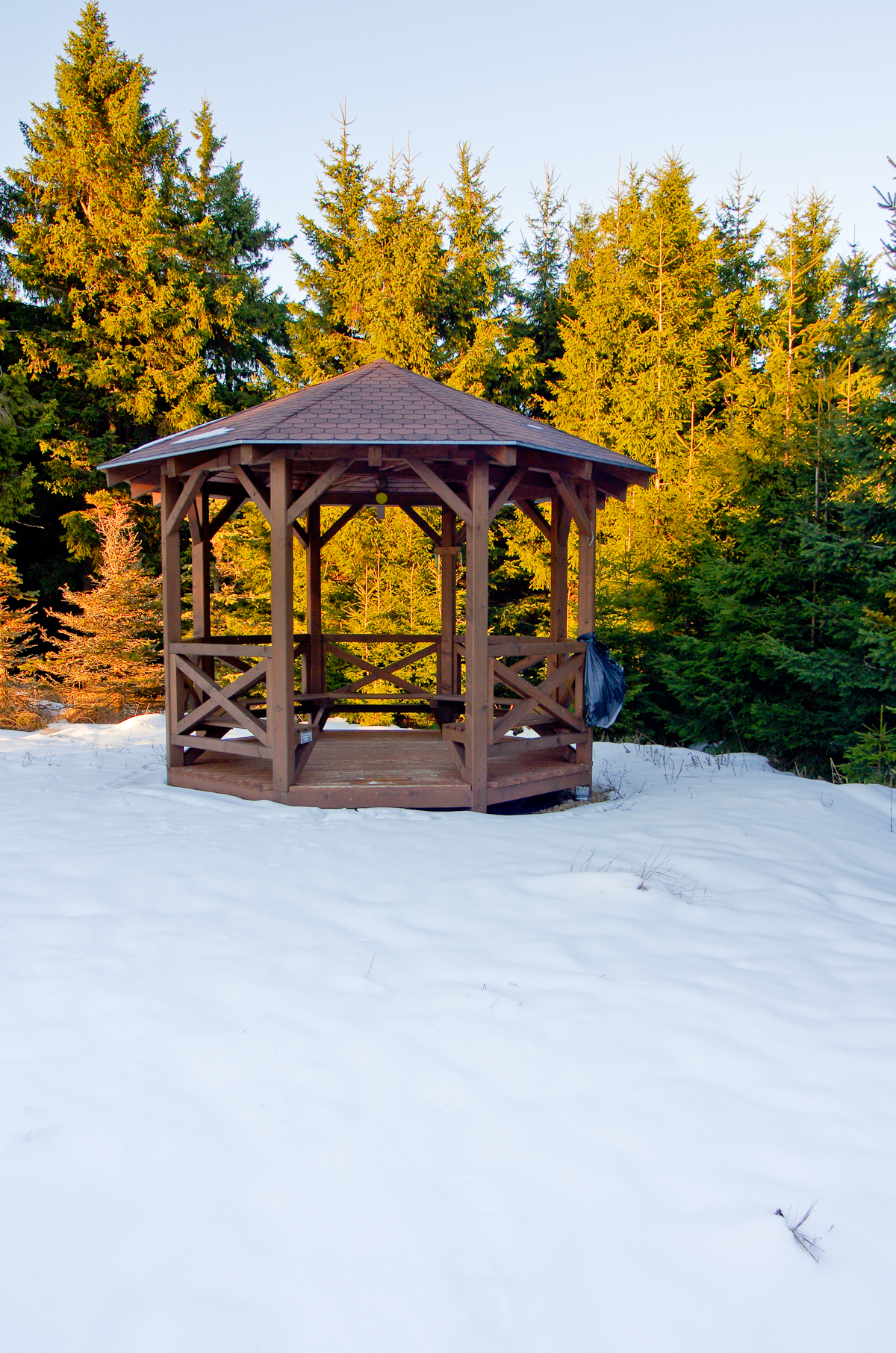 altánek na vrcholu Lesného 982,6 m n.m., nejvyšší hory Slavkovského lesa